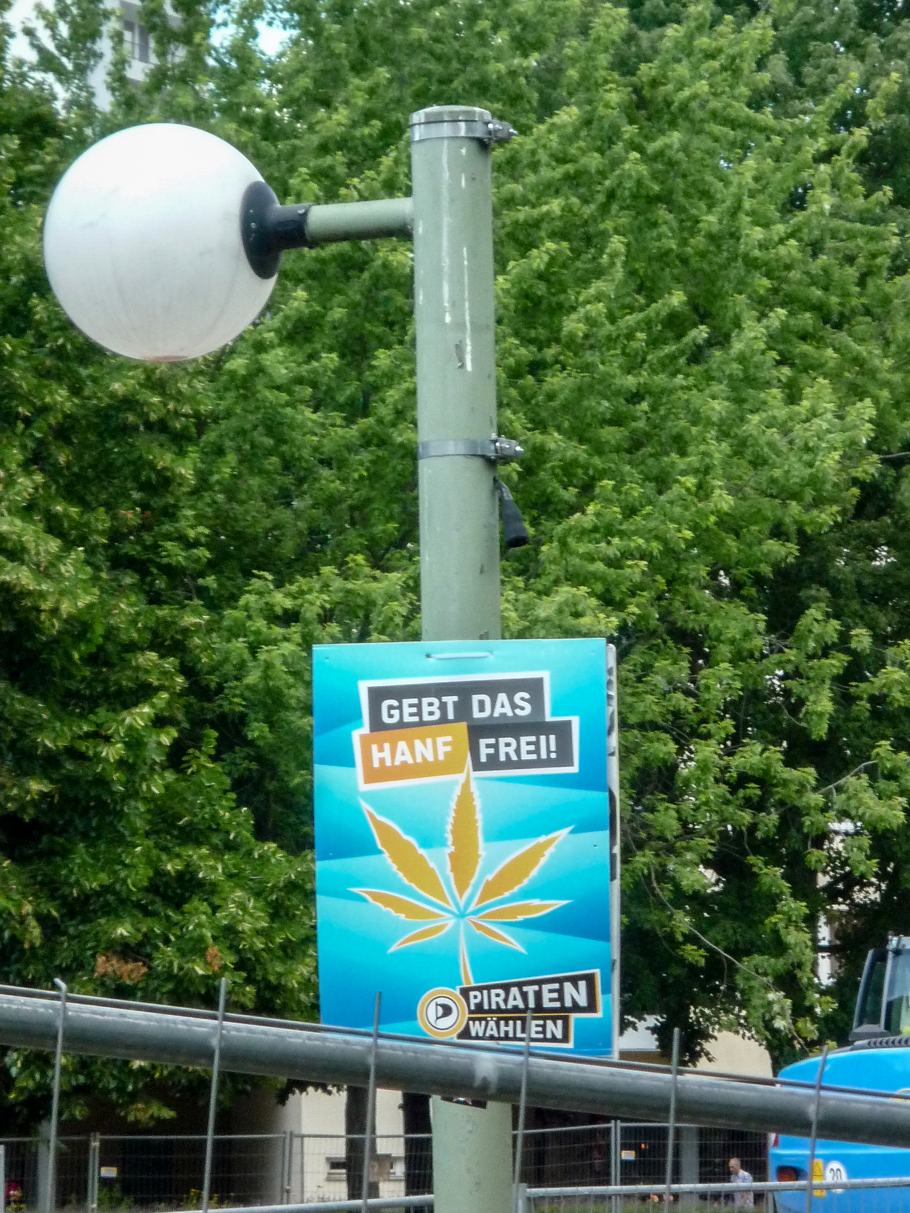 Wahlplakat der Piratenpartei 2014 in Berlin-Kreuzberg: „Gebt das Hanf frei“